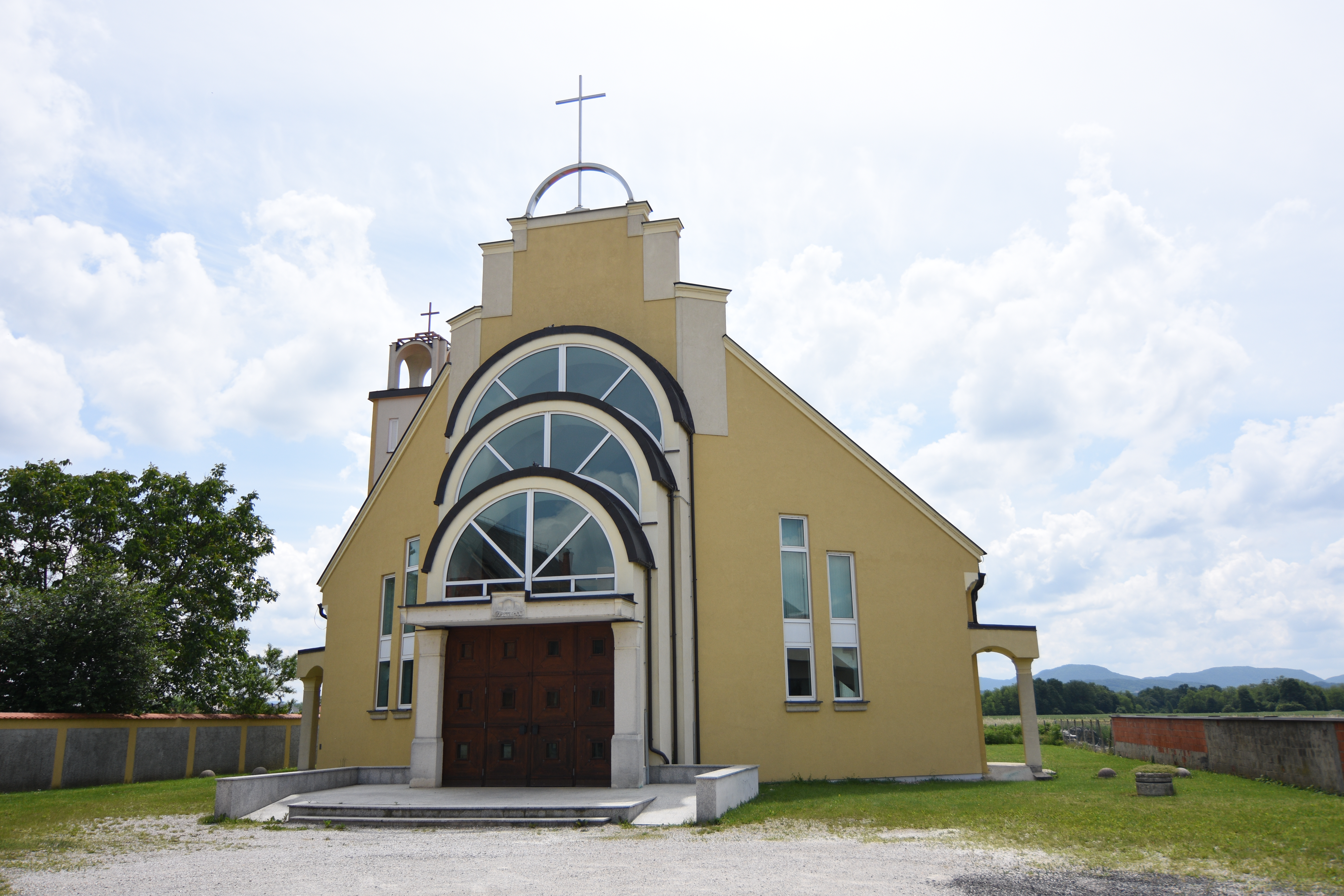 Church Nedeljanec